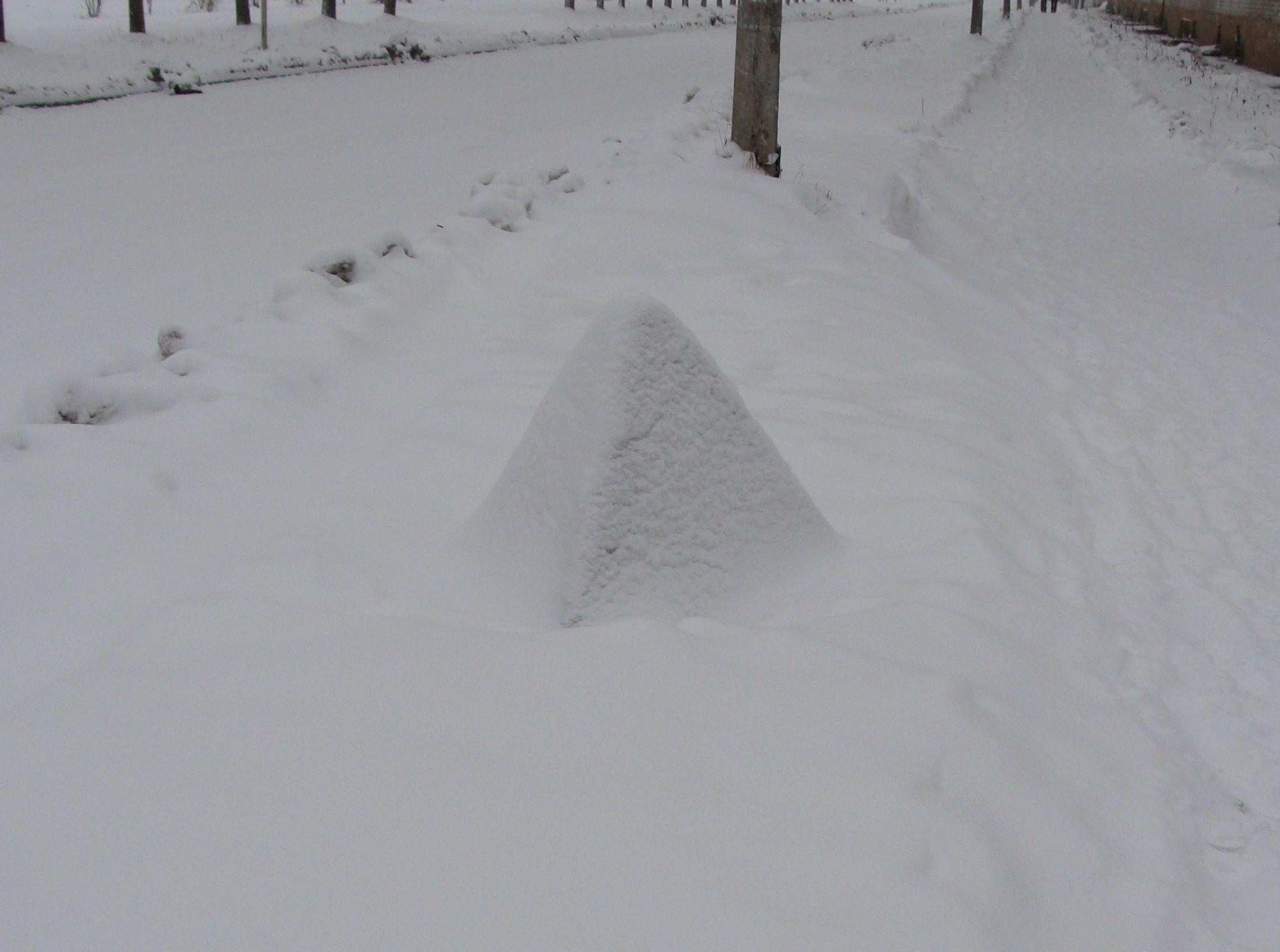 Пожарный гидрант с тумбой под снегом